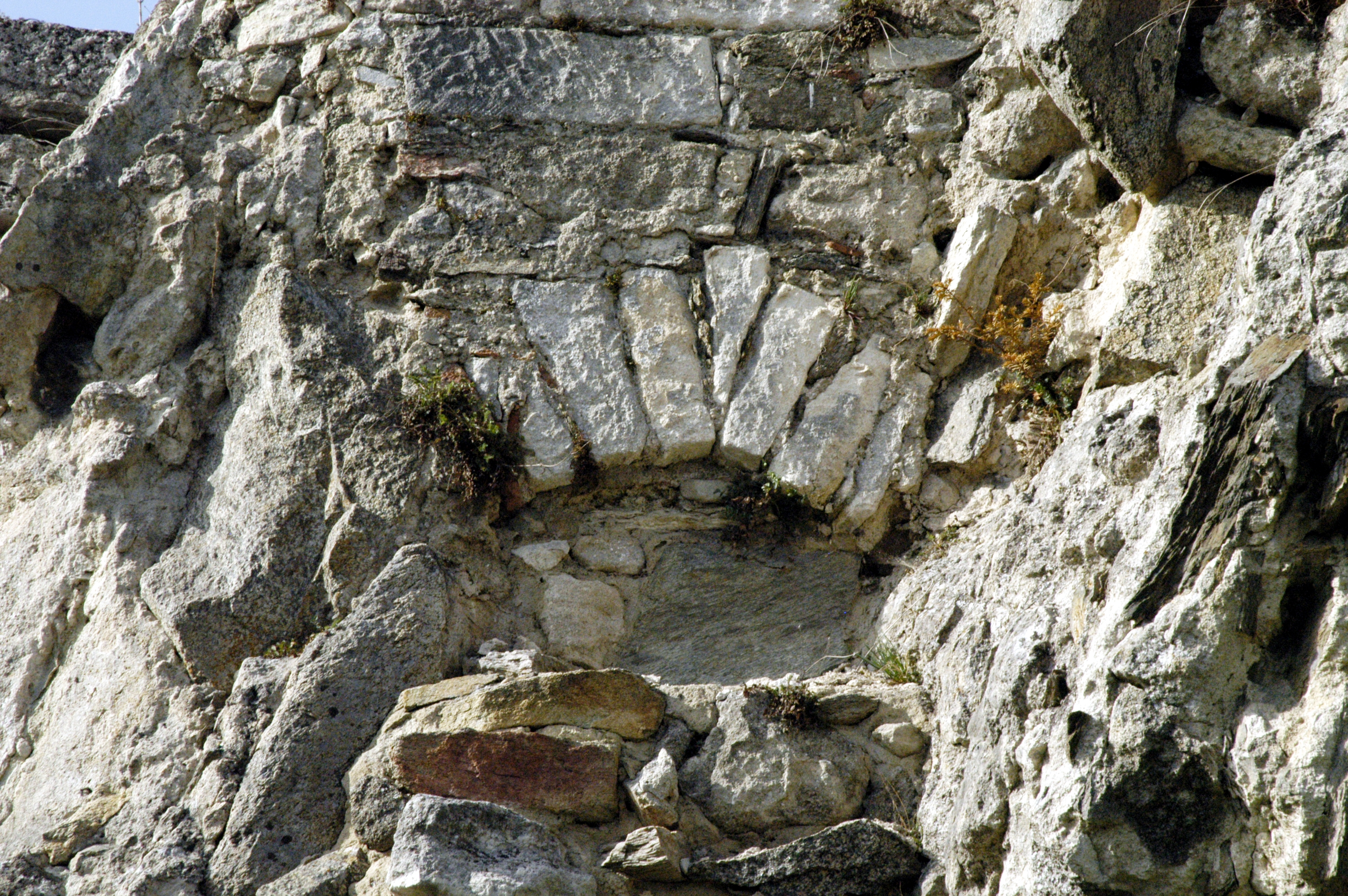 Mauerrest der Kuenringerburg (Detail)